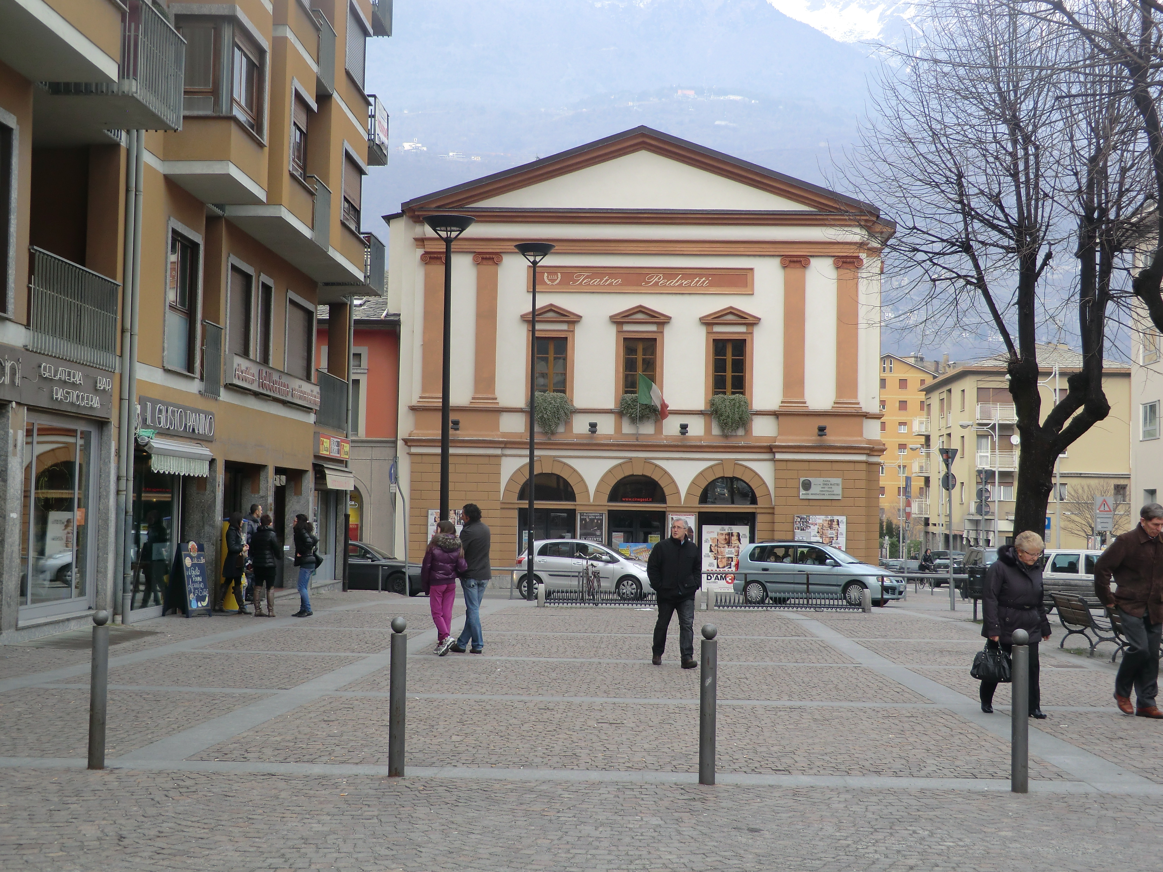 Morbegno. Piazza Mattei con il Teatro Pedretti sullo sfondo